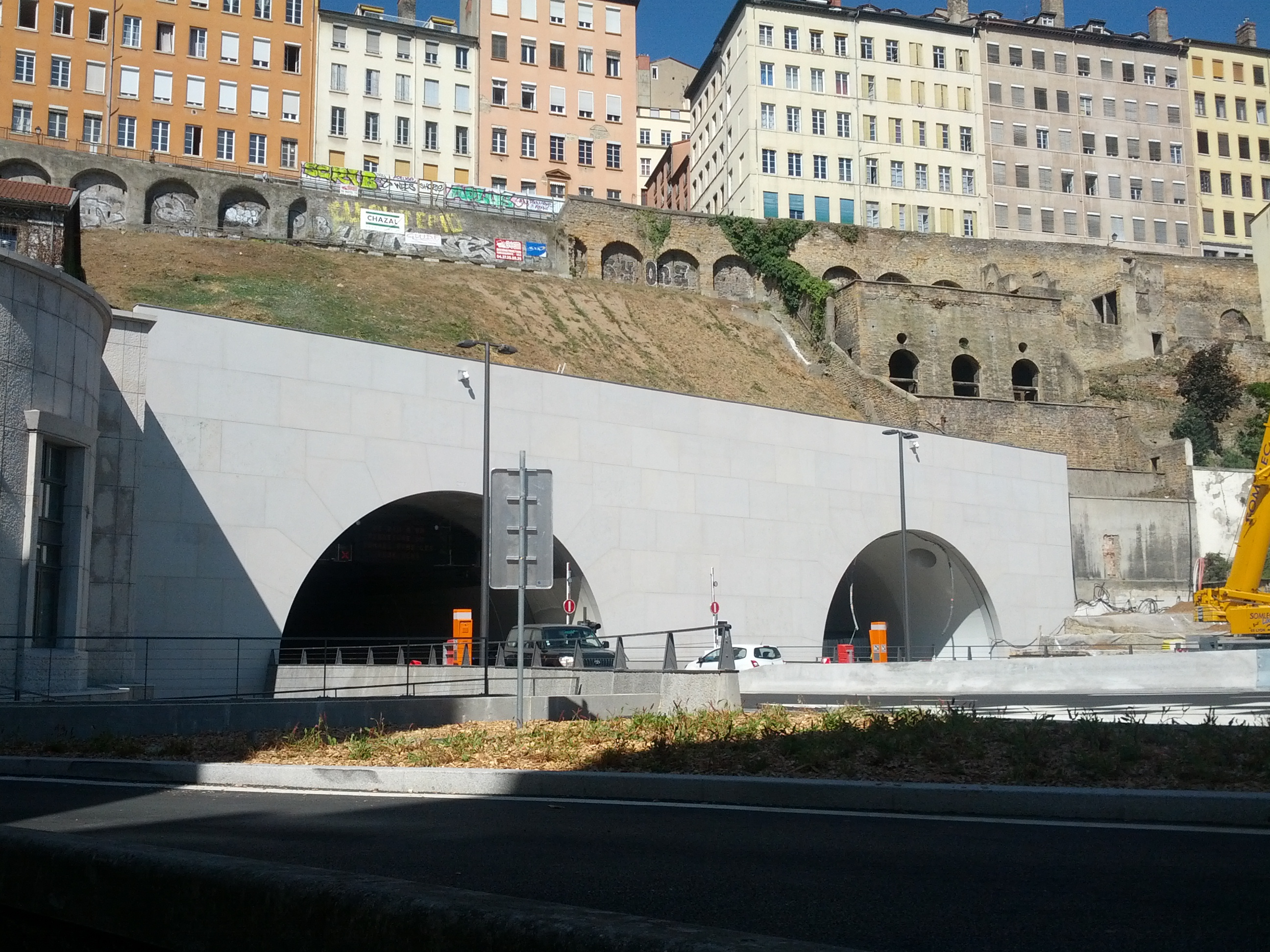 Vue de l'entrée Est (côté Rhône) du Tunnel de la Croix-Rousse